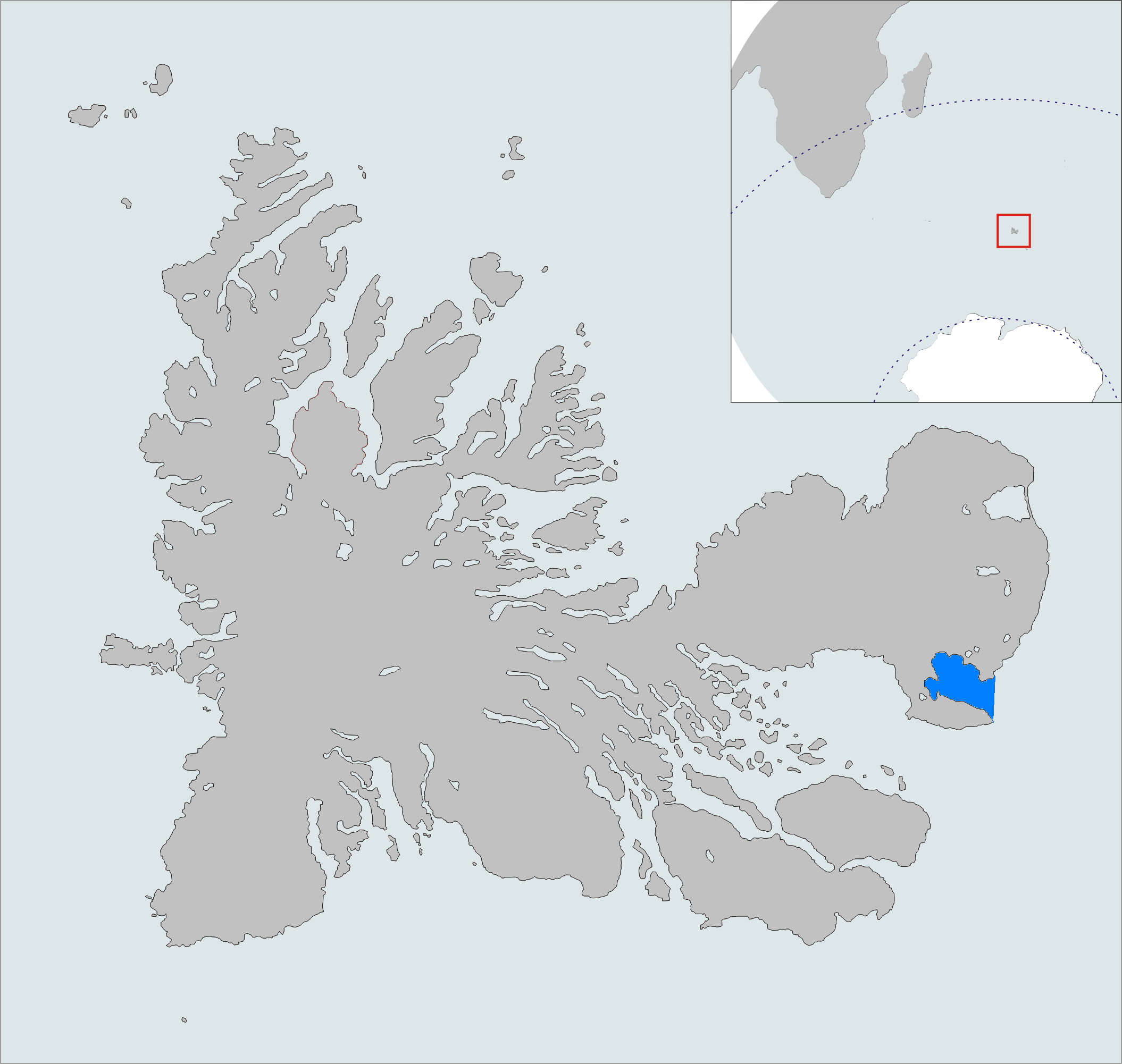 location of Baie norvégienne, Kerguelen Islands